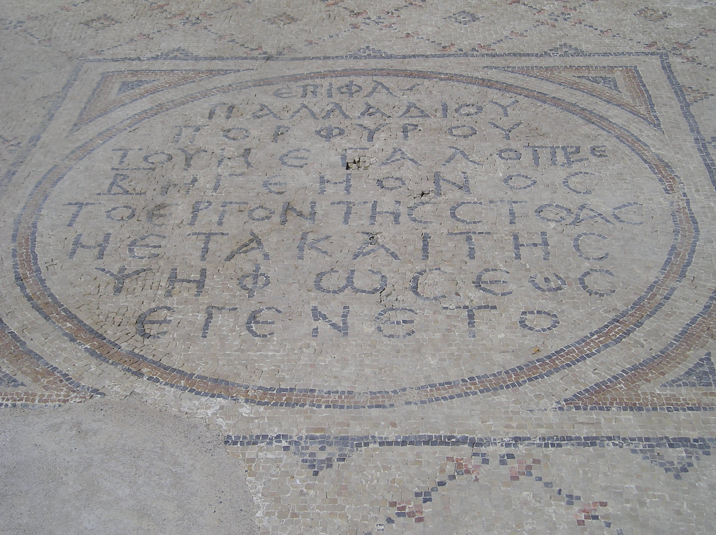 Bet Szean (stanowisko archeologiczne - Scytopolis) w Izraelu. Jedna z mozaik z Sigma.